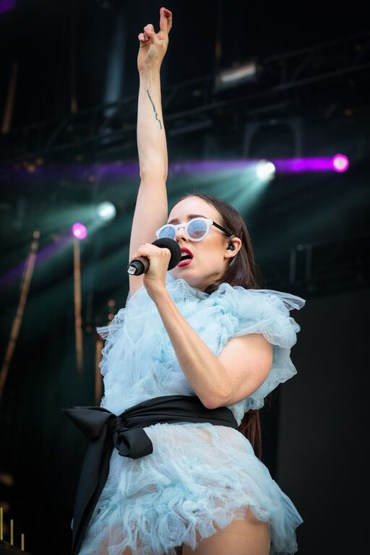 Allie X sur la scène du festival de musique Ottawa Bluesfest, le 11 juillet 2015 à Ottawa, dans l'Ontario, au Canada.